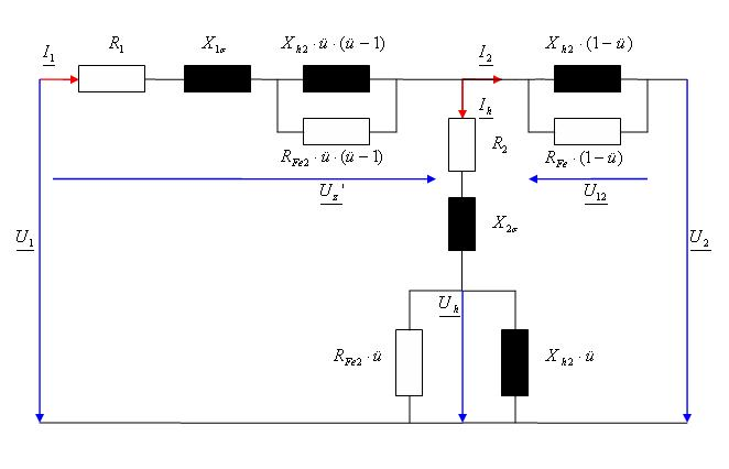 Spartransformator